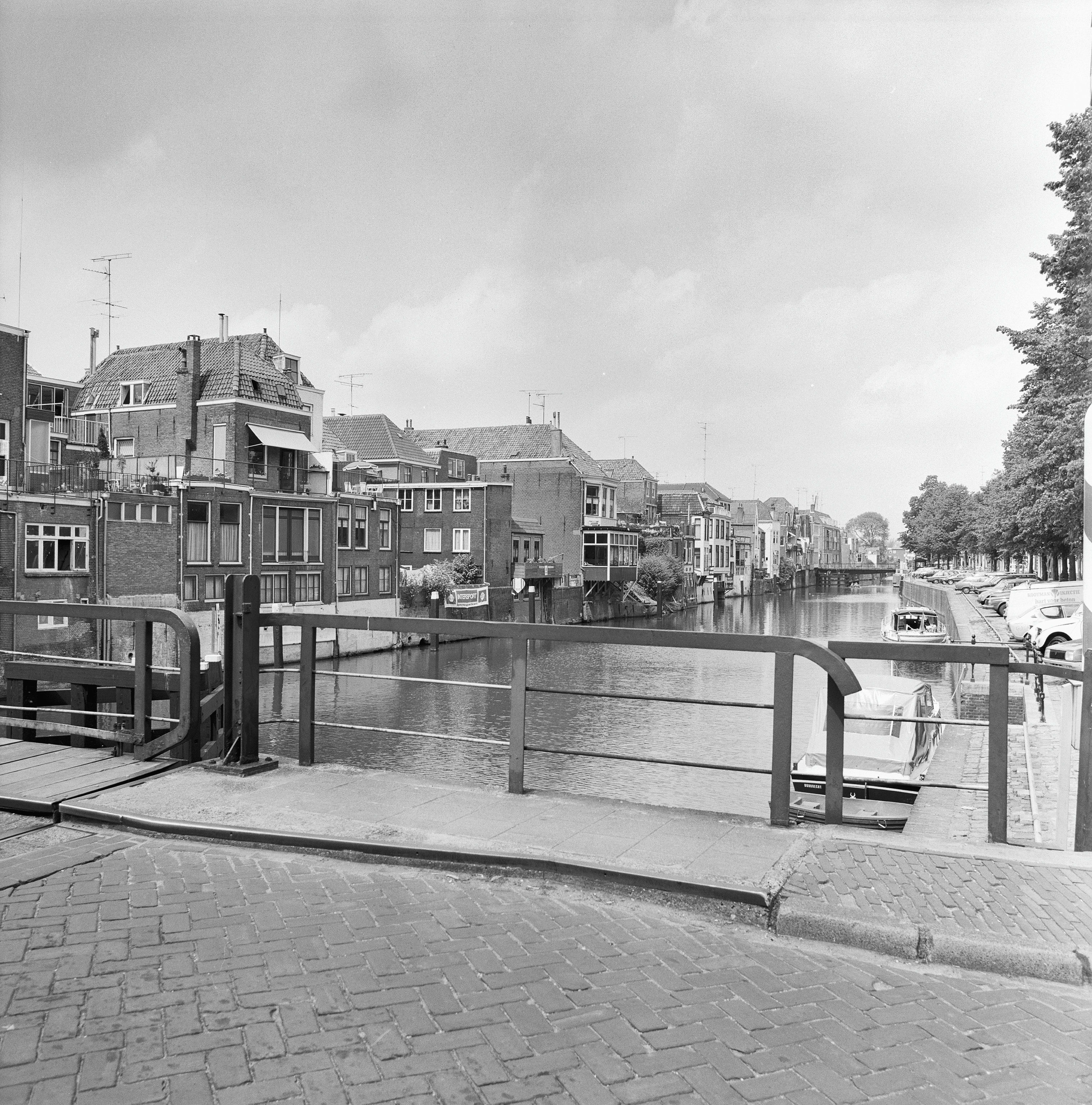 Overzichten: achtergevels